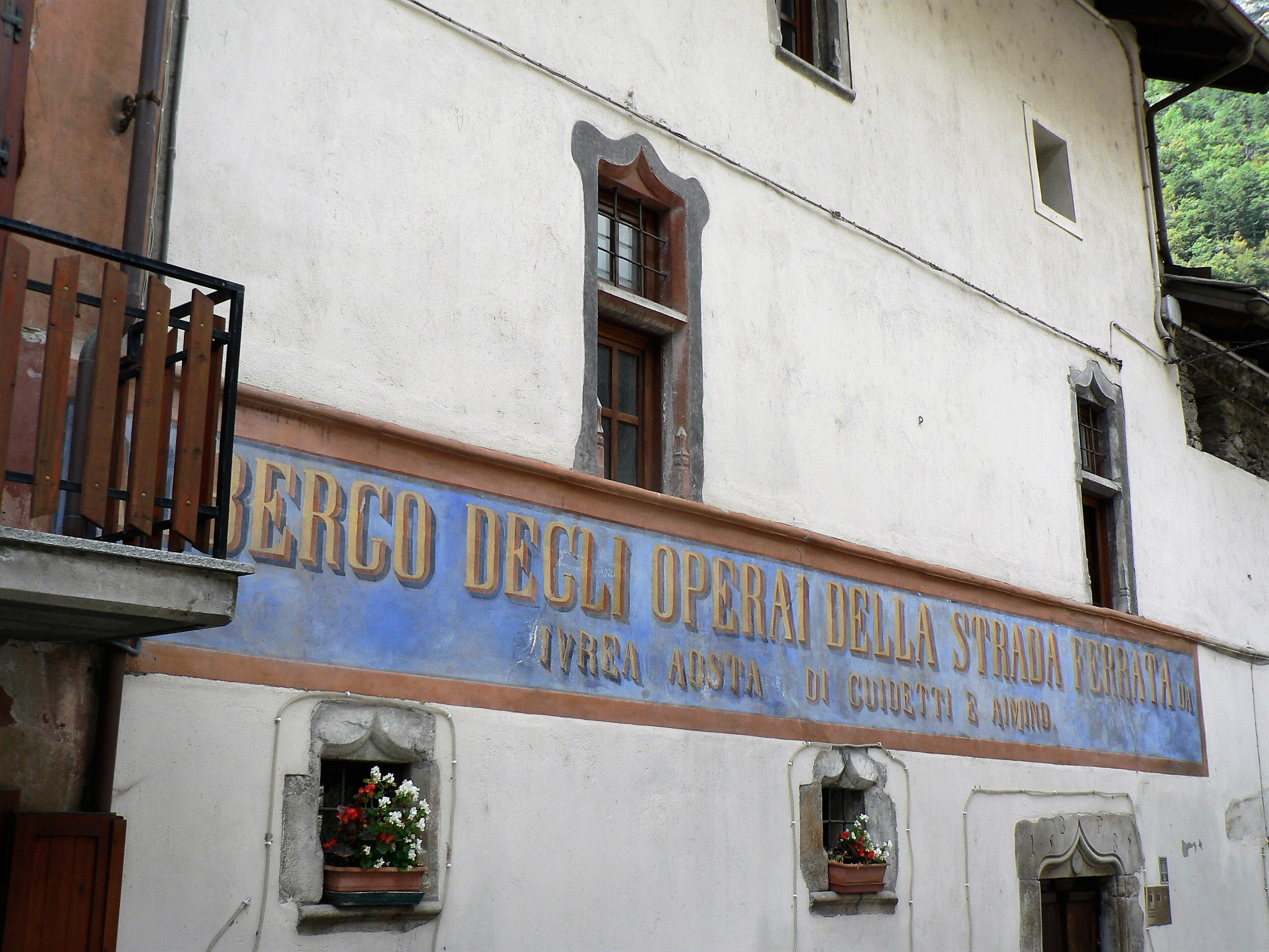 Casa del 1585 (sic), con portale e finestre gotiche, che ospito' gli operai della ferrovia Aosta-Ivrea in costruzione. A Montjovet, Valle d'Aosta, Italia. Cfr. André Zanotto, Castelli valdostani, ed. Musumeci, Quart (AO), 2002, P.114. ISBN 8870320499. Borgo di Montjovet, Valle d'Aosta, Italia.